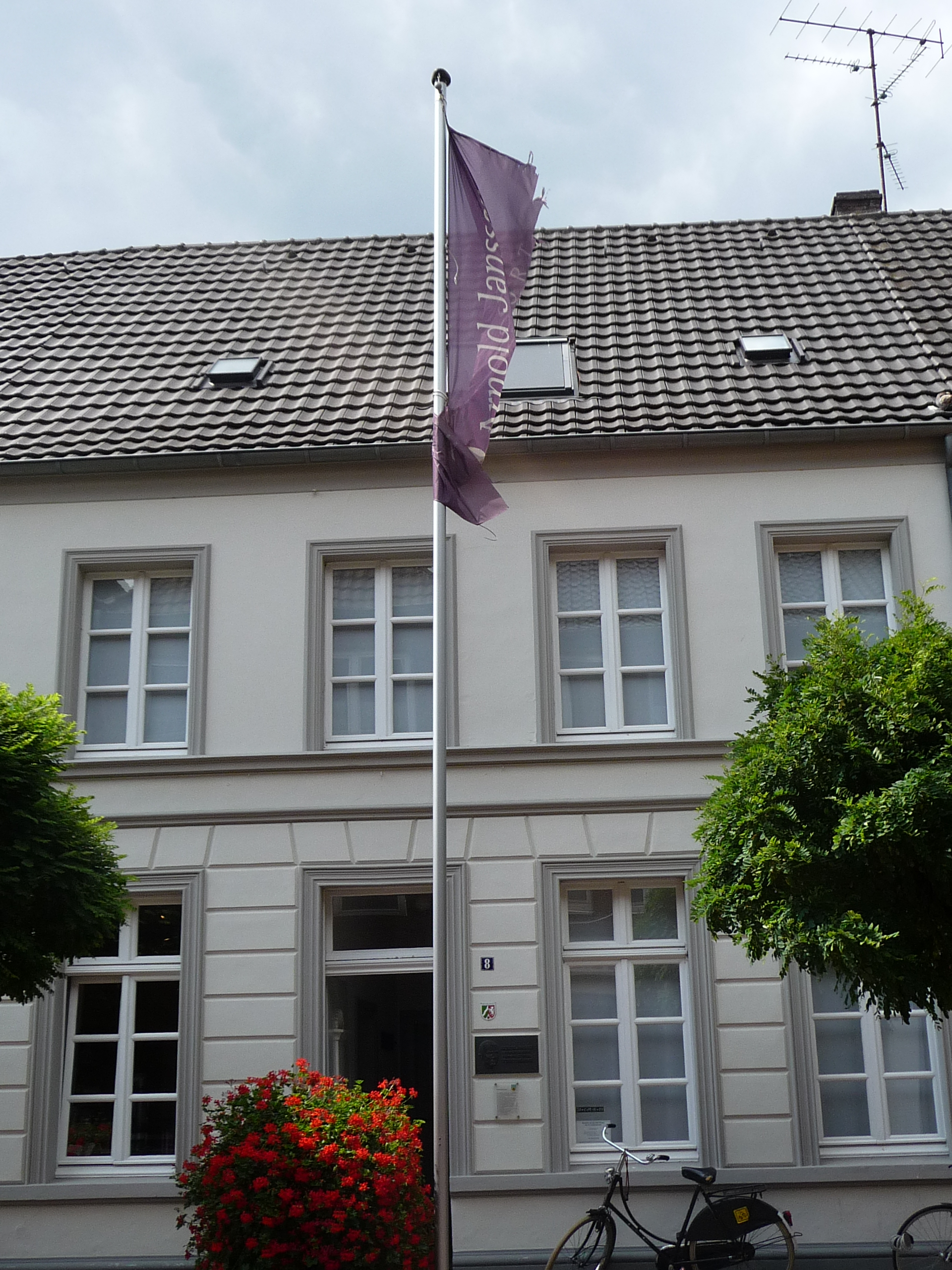 Dieses Bild zeigt das Geburtshaus von Arnold Janssen in Goch